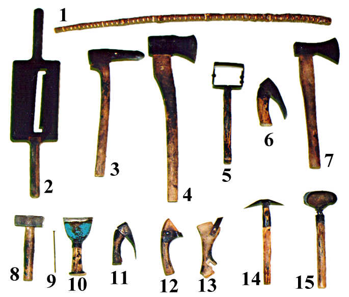 Verschiedene Werkzeuge der Pecherei: Zu sehen sind: 1 Rowisch, 2 Schartenhobel, 3 Schrott- oder Mondhackl, 4 Anzeschhacke, 5 Rintler, 6 Fürhackdexel, 7 Fürhackhacke, 8 Anschlaghammer, 9 Pechnagel, 10 Anschlageisen, 11 Plätzdexel, 12 Hobel, 13 Ritzer, 14 Pechkrickel, 15 Pechscherreisen Das Bild gibt die natürlichen Größenverhältnisse der einzelnen Werkzeuge zueinander (mit Ausnahme des vergrößert dargestellten Rowischs) richtig wieder. Alle Werkzeuge stammen aus dem Raum um Hernstein im südlichen Niederösterreich. Zu den Dexel siehe auch: Dexel.